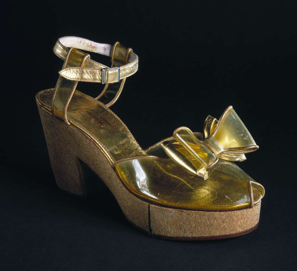 Damsandalett med hög, bred klack av kork och ovandel av genomskinlig plast. Tillverkad vid Hästens Skofabrik i Uppsala, andra hälften av 1940-talet. Nordiska museest föremål inv.nr 283386.